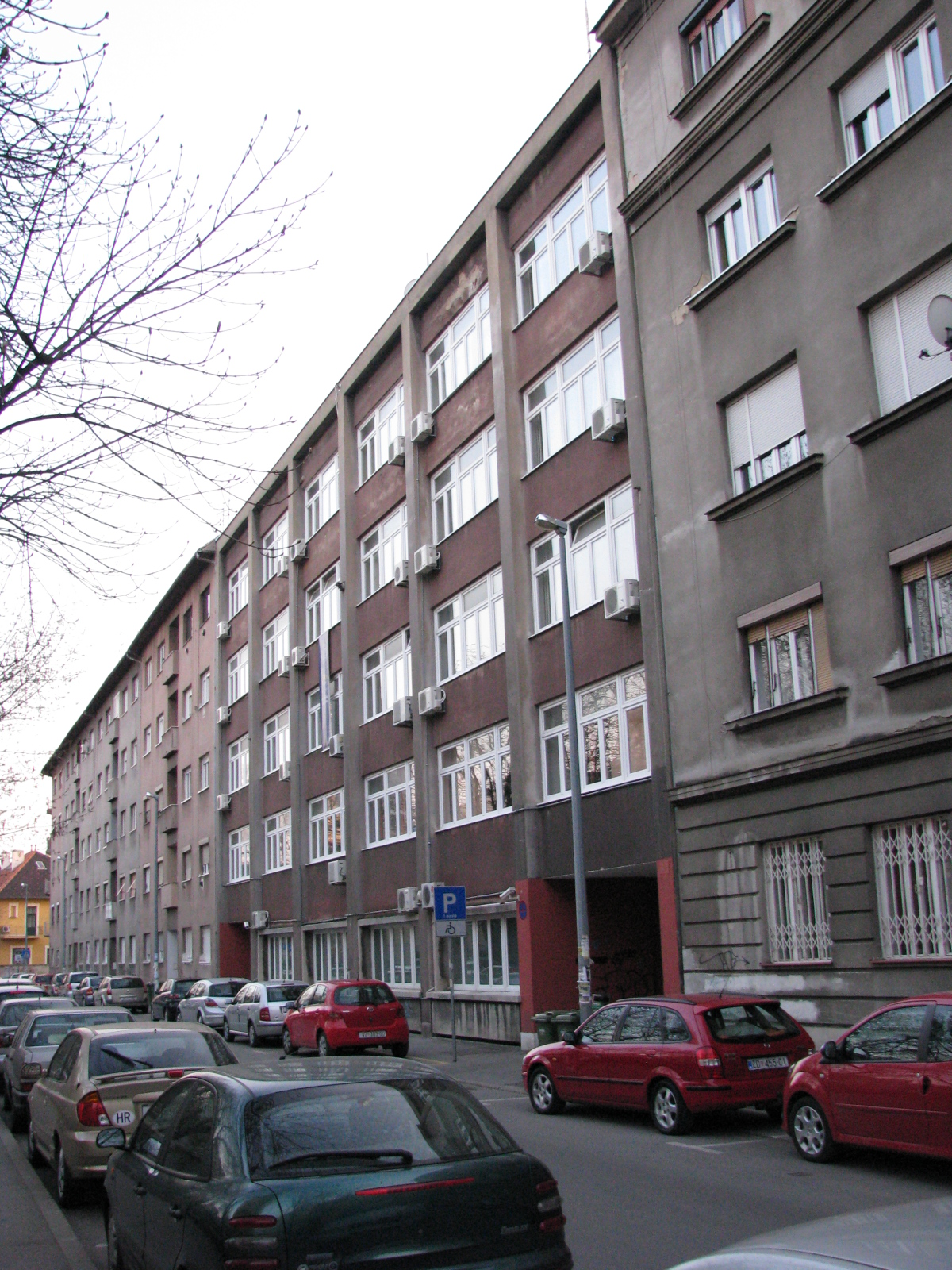 Fakultet političkih znanosti u Zagrebu